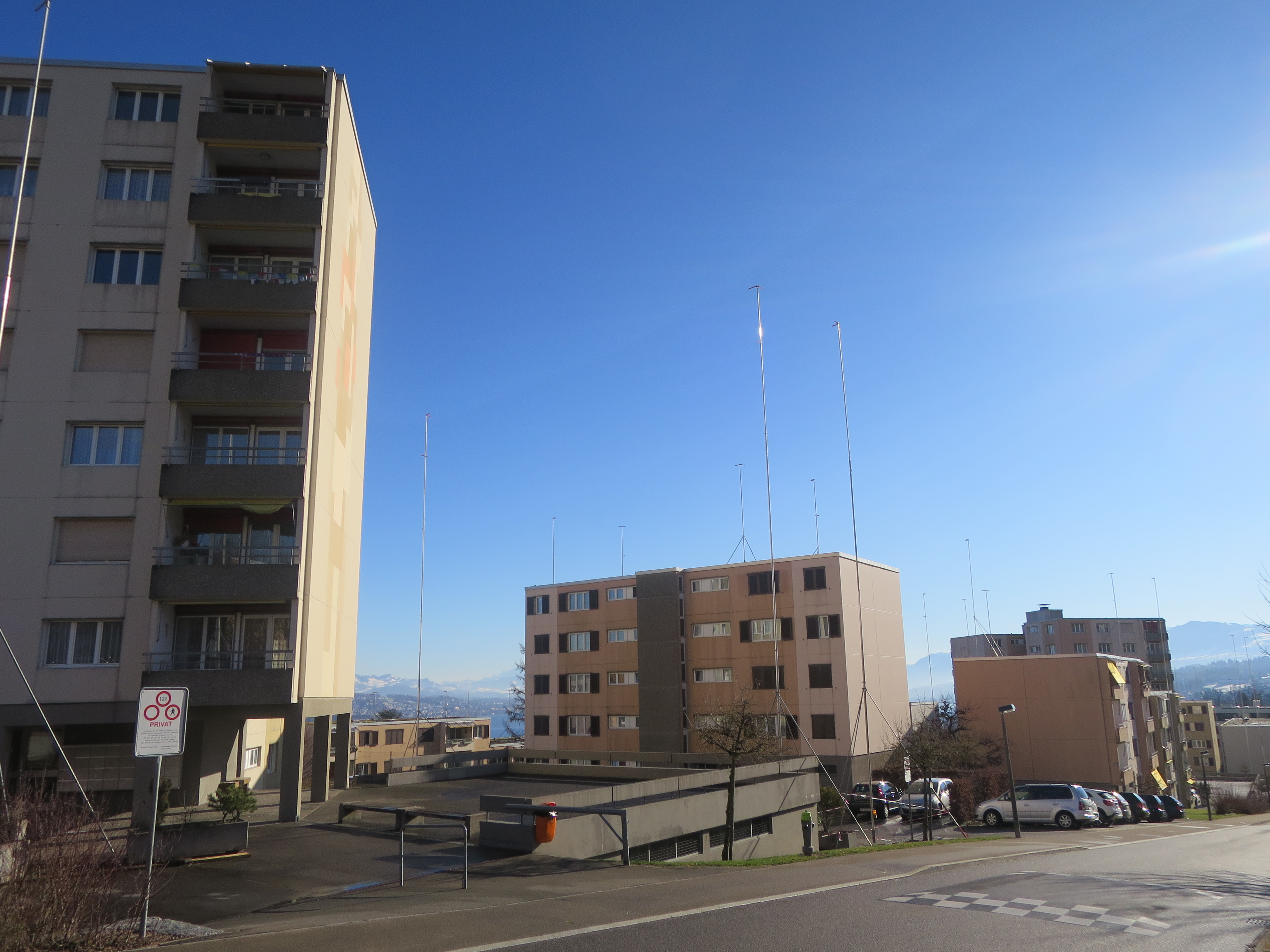 Mittelteil der Siedlung Hangenmoos in Wädenswil, erbaut 1968-1973 nach Plänen von Hans Fischli, abgerissen 2019 zugunsten spekulativer Luxusobjekte.